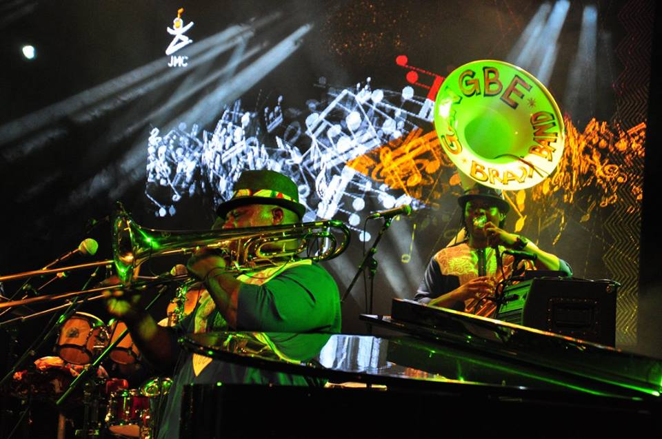 Spectacle Athanase Dehoumon Gangbé 15 avril lors des JMC 2016 ( Journées Musicales de Carthage ) This is an image of music and dance from Tunisia